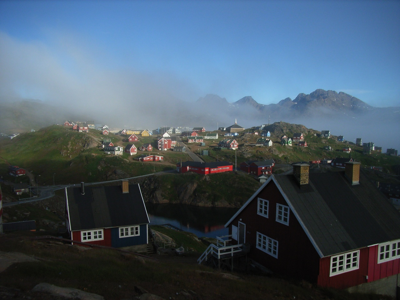 Tasiilaq – Ortskern im Morgennebel